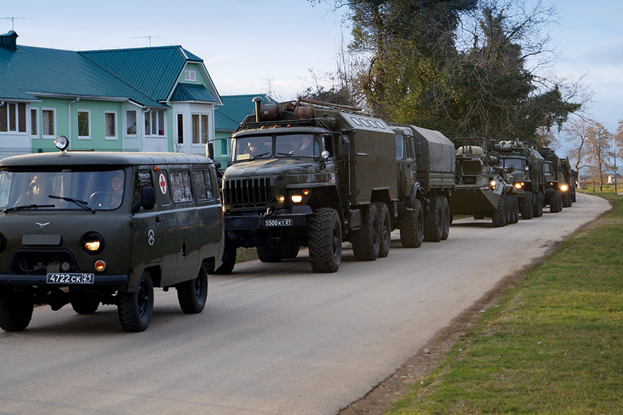 Выход по тревоге подразделений российской 7-й военной базы в Абхазии в ходе внезапной проверки боеготовности войск Южного военного округа.